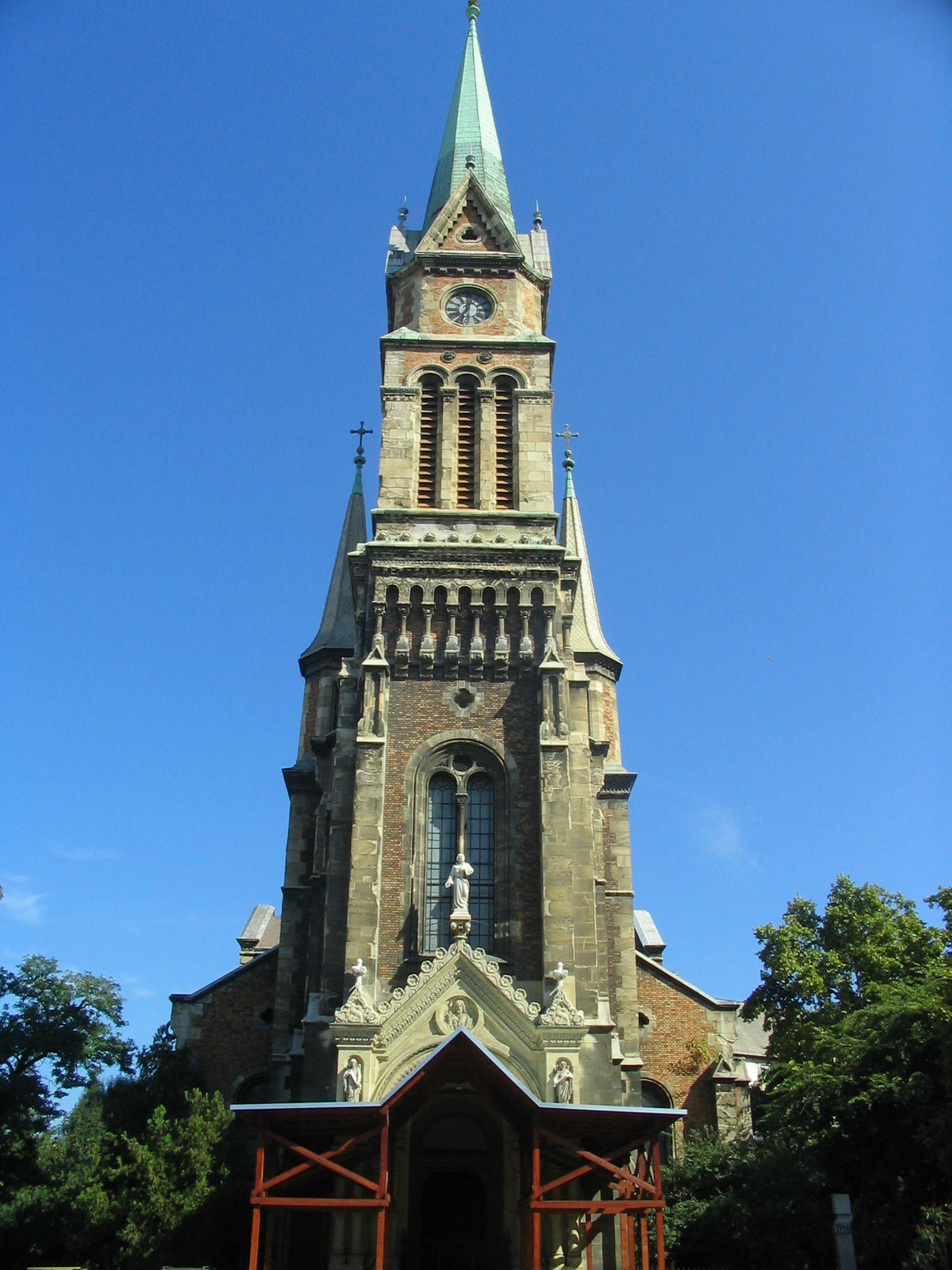 Ferencvárosi r.k. templom (Budapest 9, Bakáts tér) This is a photo of a monument in Hungary, Identifier: 1026